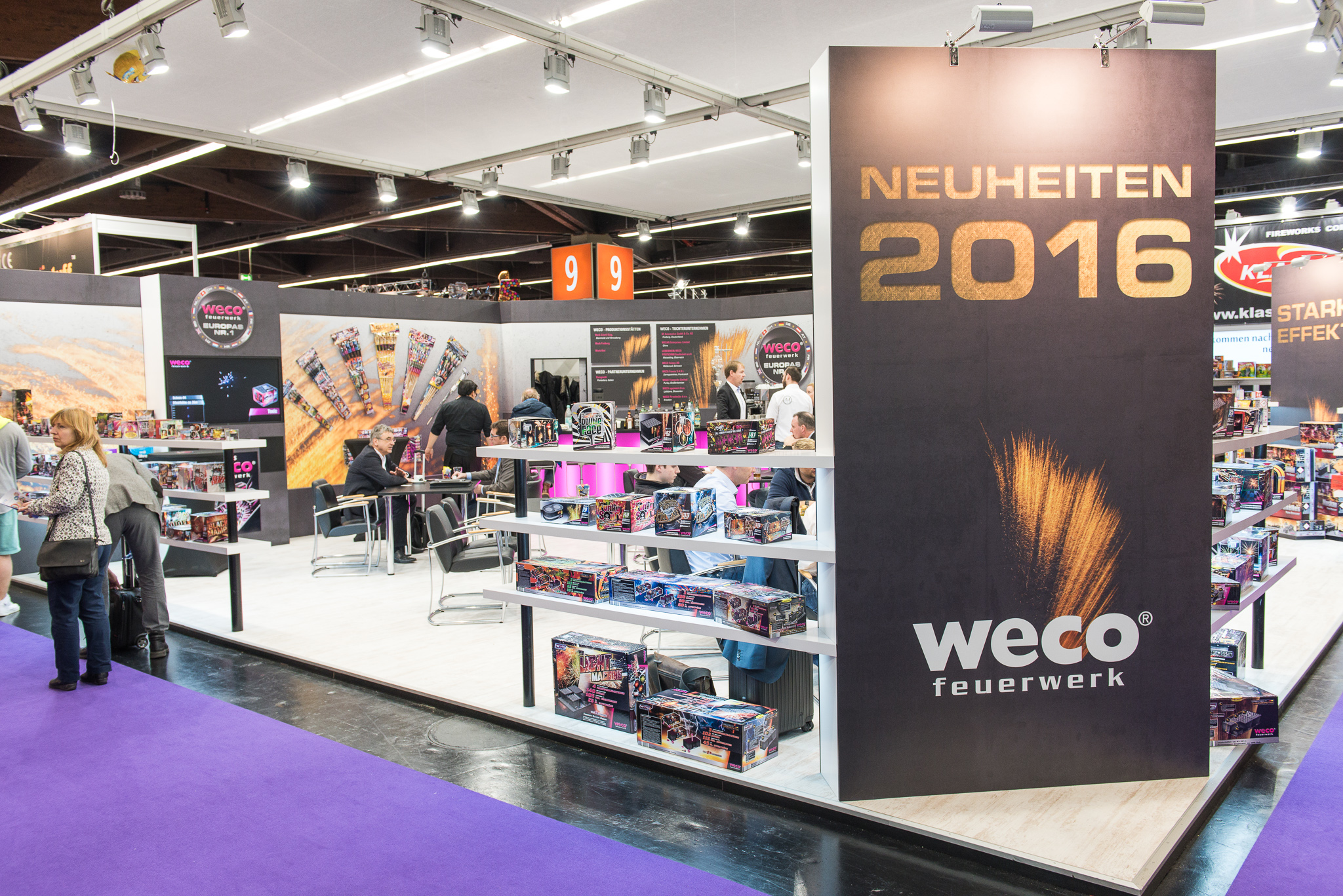 International Toy Fair Nürnberg,Messestand,Spielwarenmesse,WECO Pyrotechnische Fabrik GmbH